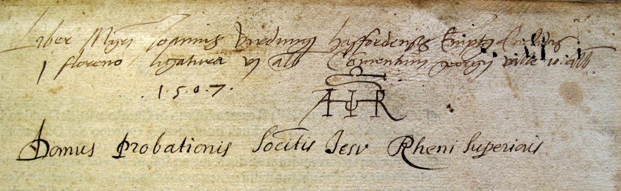 eigenhändiger Besitzeintrag des Johannes Virdung in einem Druck I g:2º / 50, Nr. 2 der Stadtbibliothek Mainz = [Euclidis megarensis philosophi platonici Mathematicarum disciplinarum Ianitoris: Habent in hoc volumine quicumque ad mathematicam substantiam aspirant elementorum libros. xiii] Venedig 1505